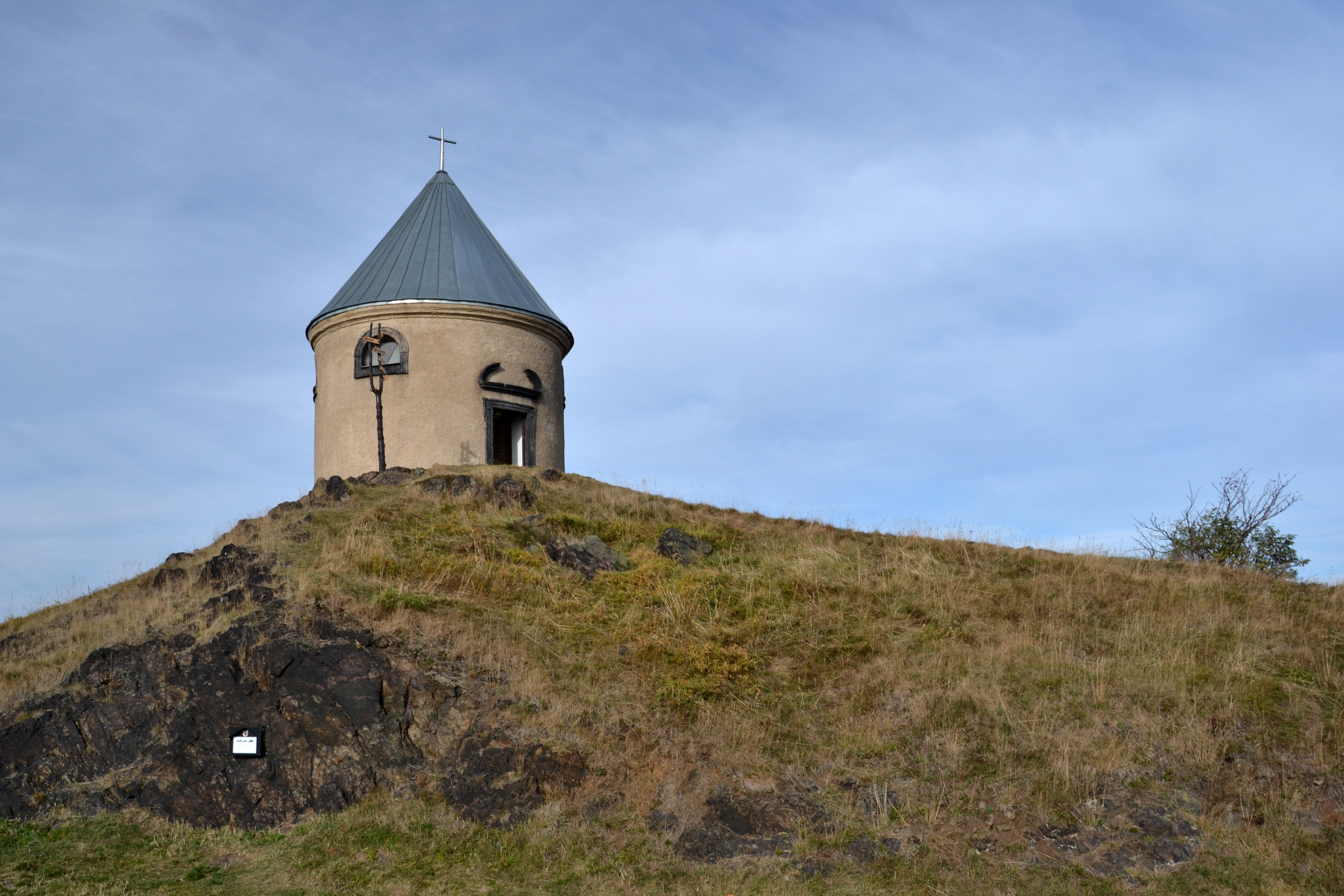 Kaple Neposkvrněného početí P. Marie (Měděnec), návrší S od obce, Měděnec